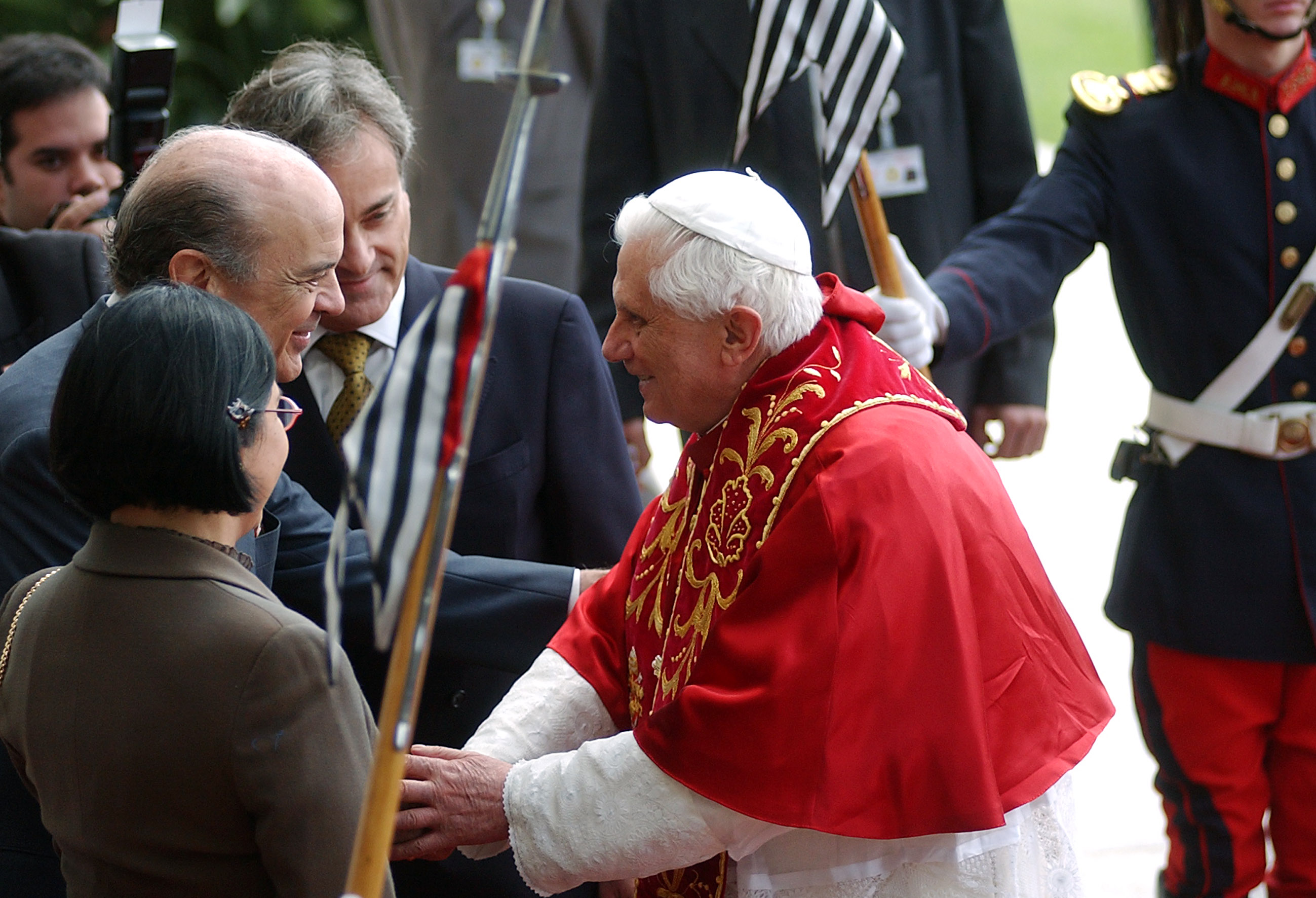 Papa Bento XVI chega ao Palácio dos Bandeirantes, residência oficial do governador do estado de São Paulo.